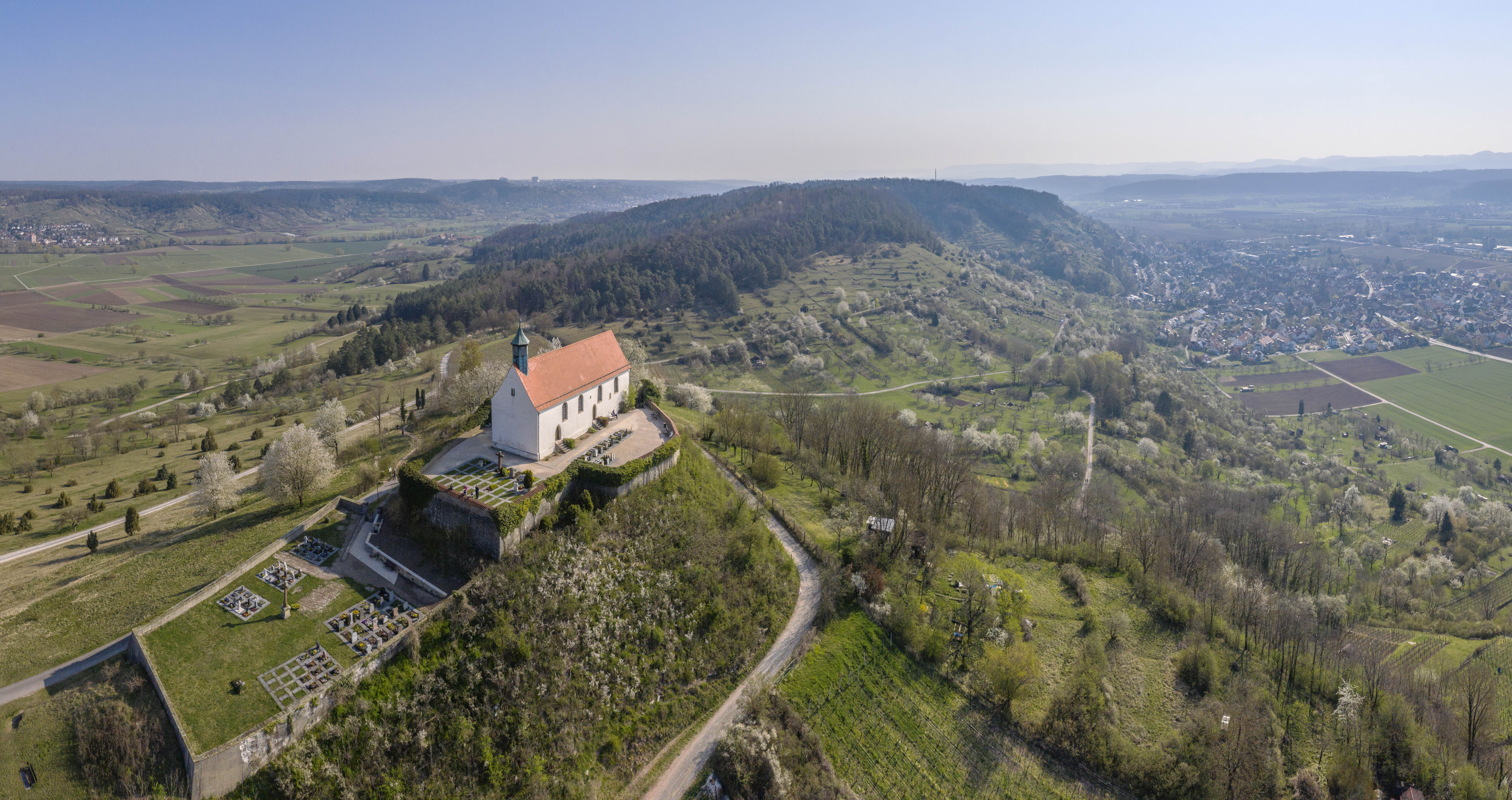 Sankt-Remigius-Kapelle in WurmlingenDepicted place: Q1523041